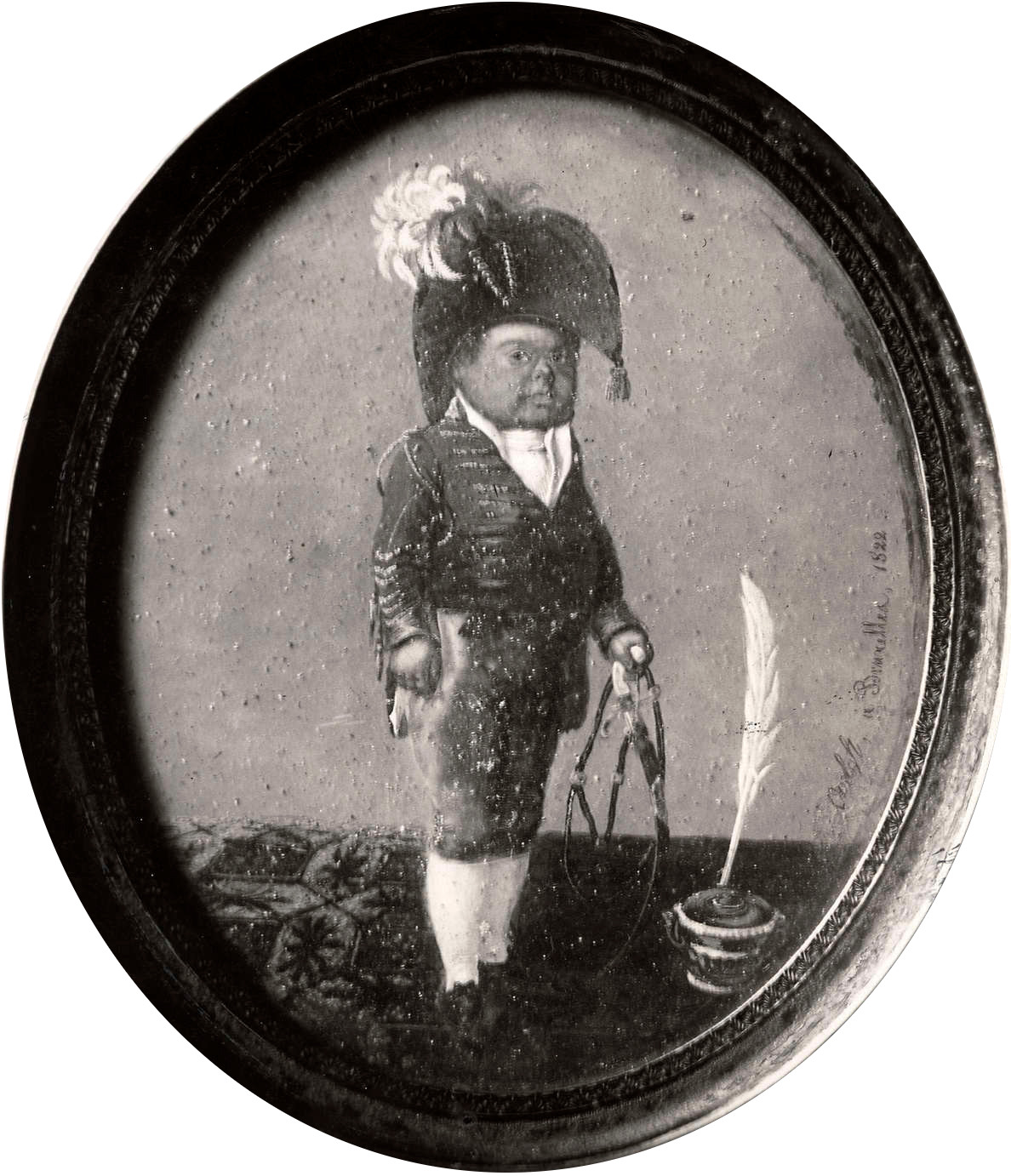 Dwergen. Lilliputters. Schilderij van de kleinste Nederlander die ooit leefde, Simon Paap uit Zandvoort (1789-1829), 76 cm lang. Bruxelles, 1822.